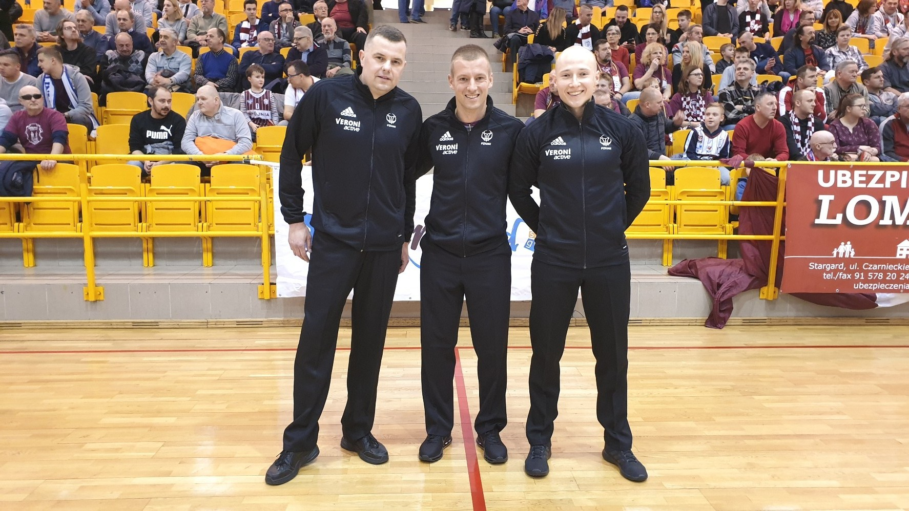 Sędziowie: Spójnia - Anwil